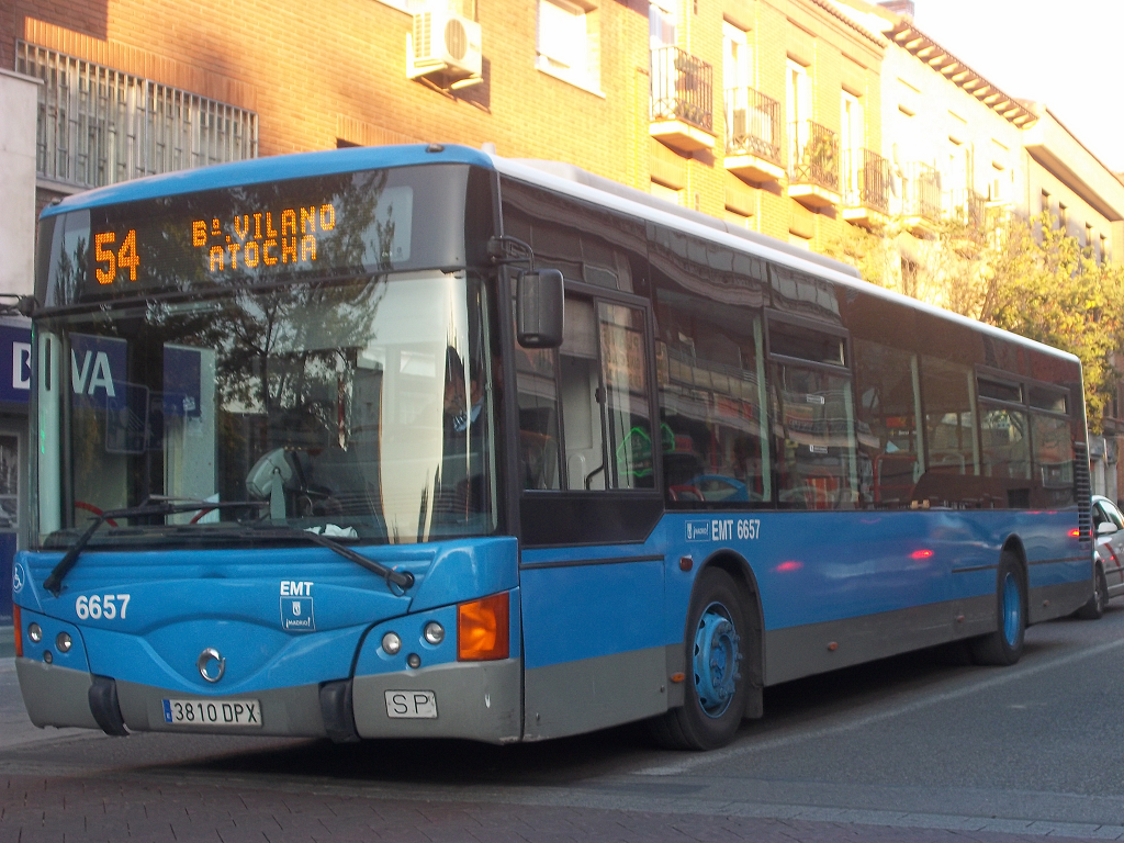 Autobus de la linea 54 de la EMT de Madrid